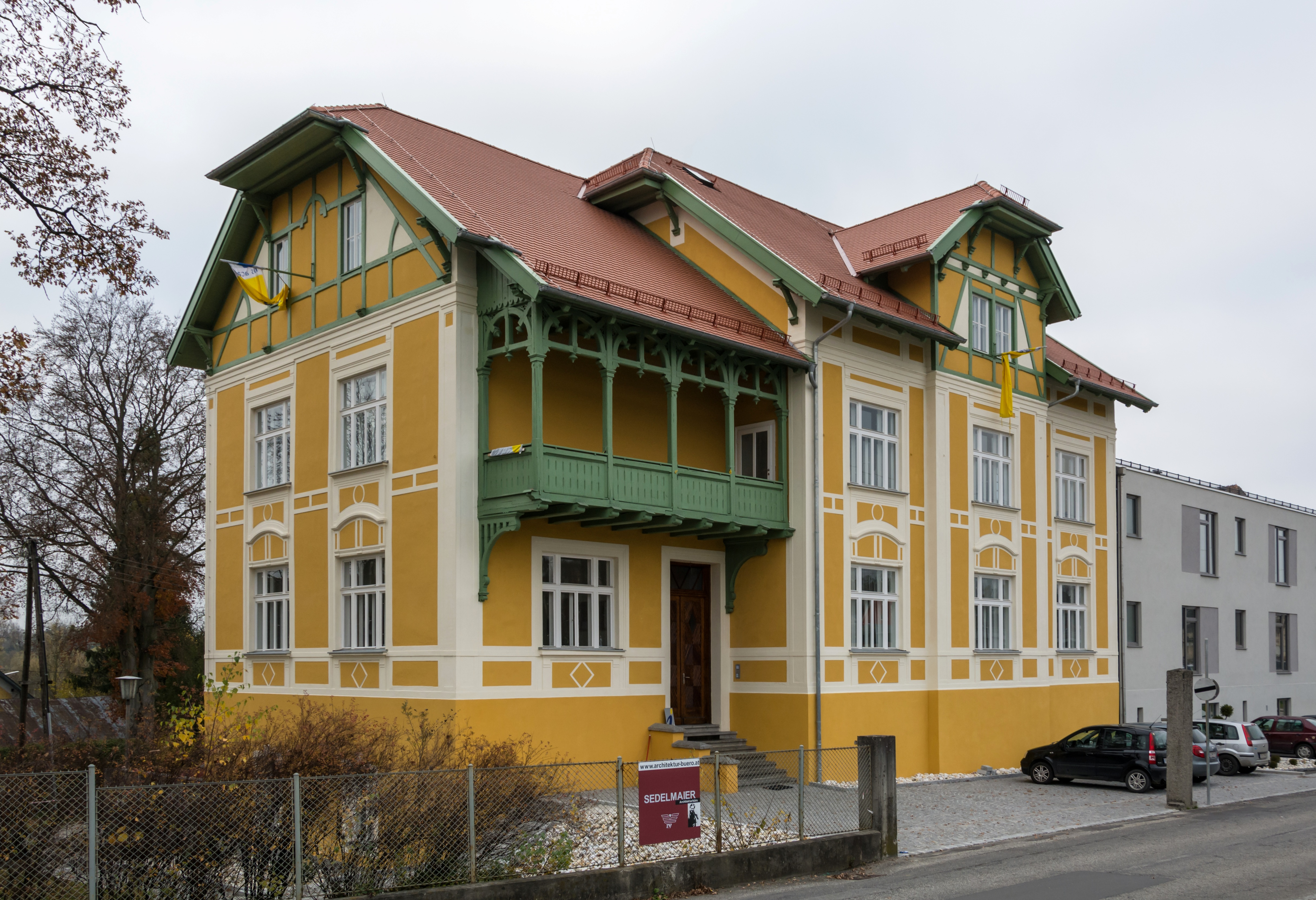 Verwaltungsgebäude der Schärdinger Molkerei samt Ausstattung